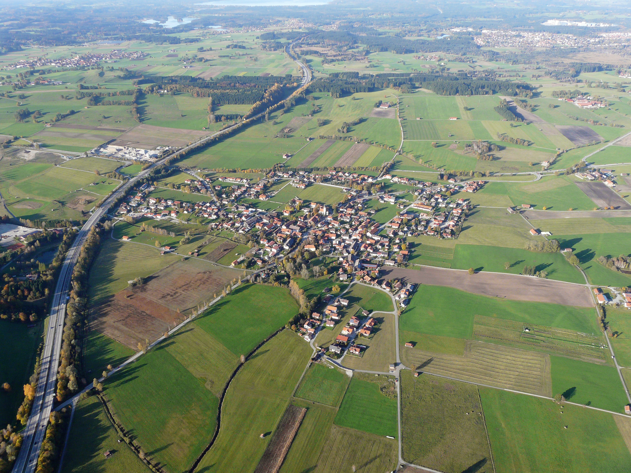 Sindelsdorf von Süden aus der Luft